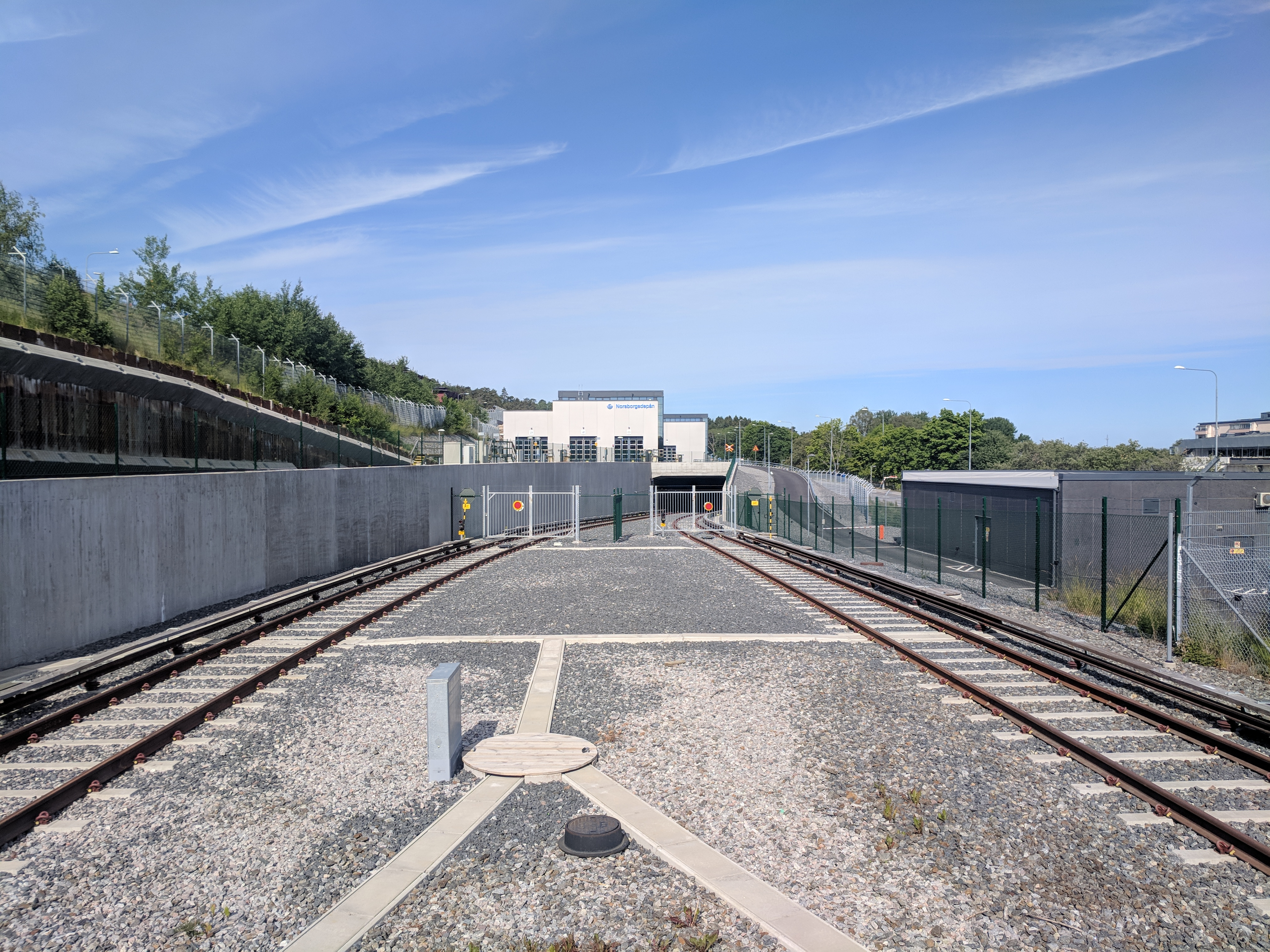 Norsborg tunnelbana